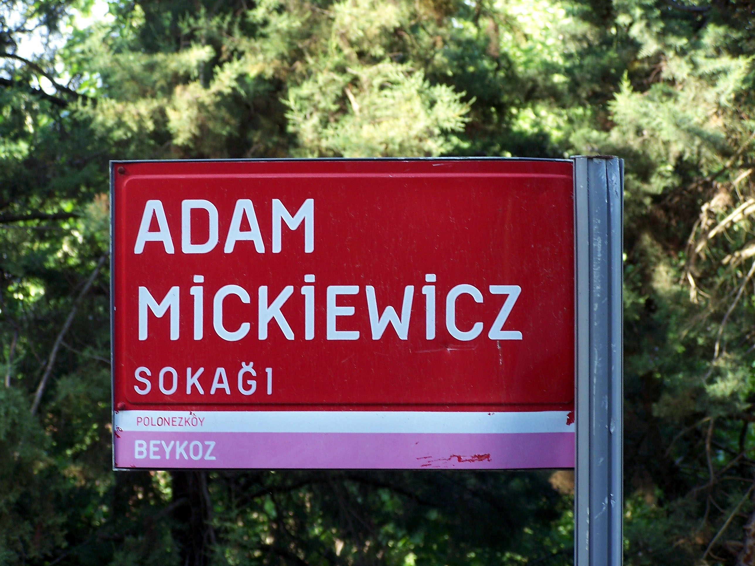 Adam Mickiewicz Sokağı in Polonezköy, Turkey